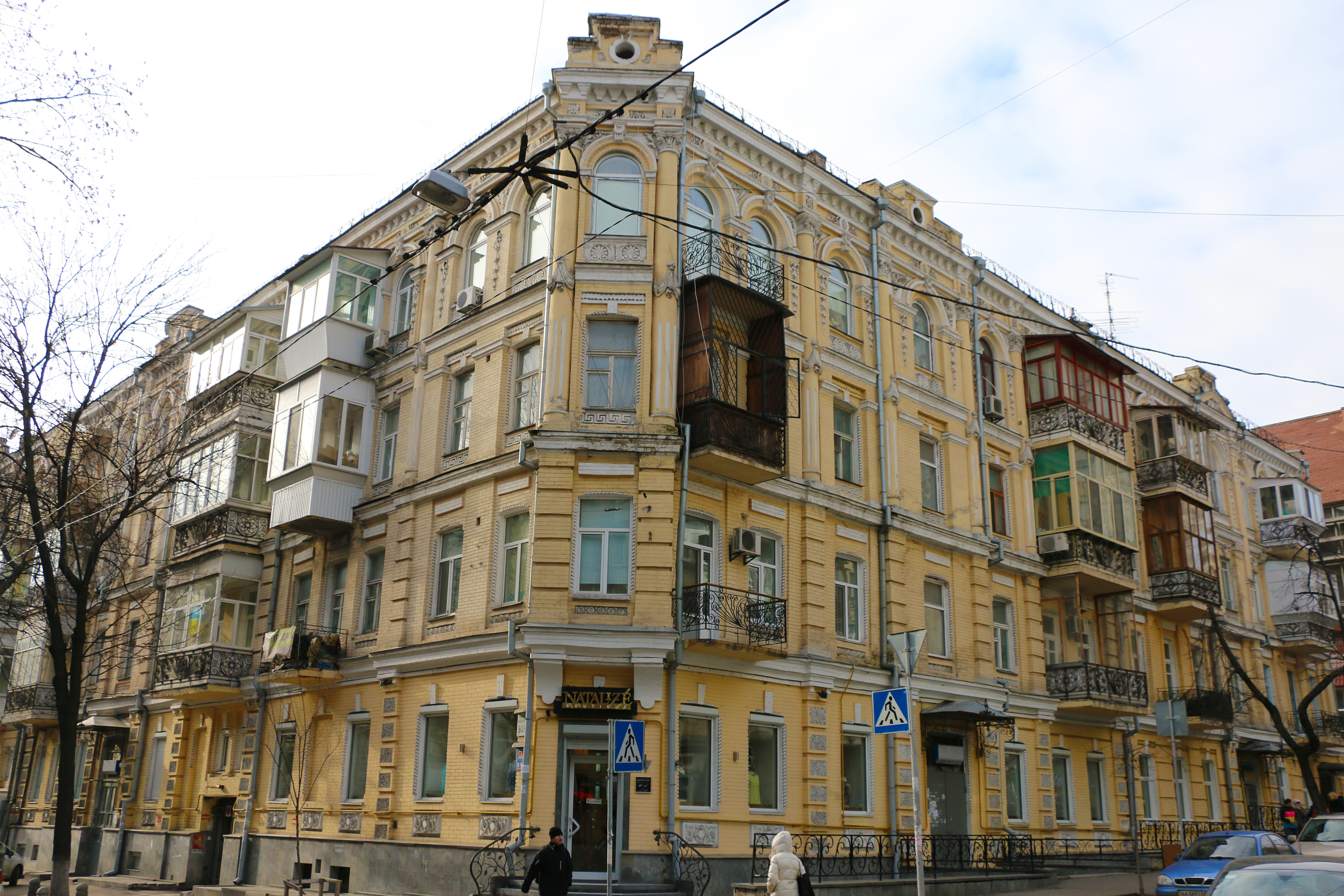 Будинок прибутковий, де мешкав Б. В. Якубовський, літературознавець, Київ, Гончара Олеся вул., 90-92